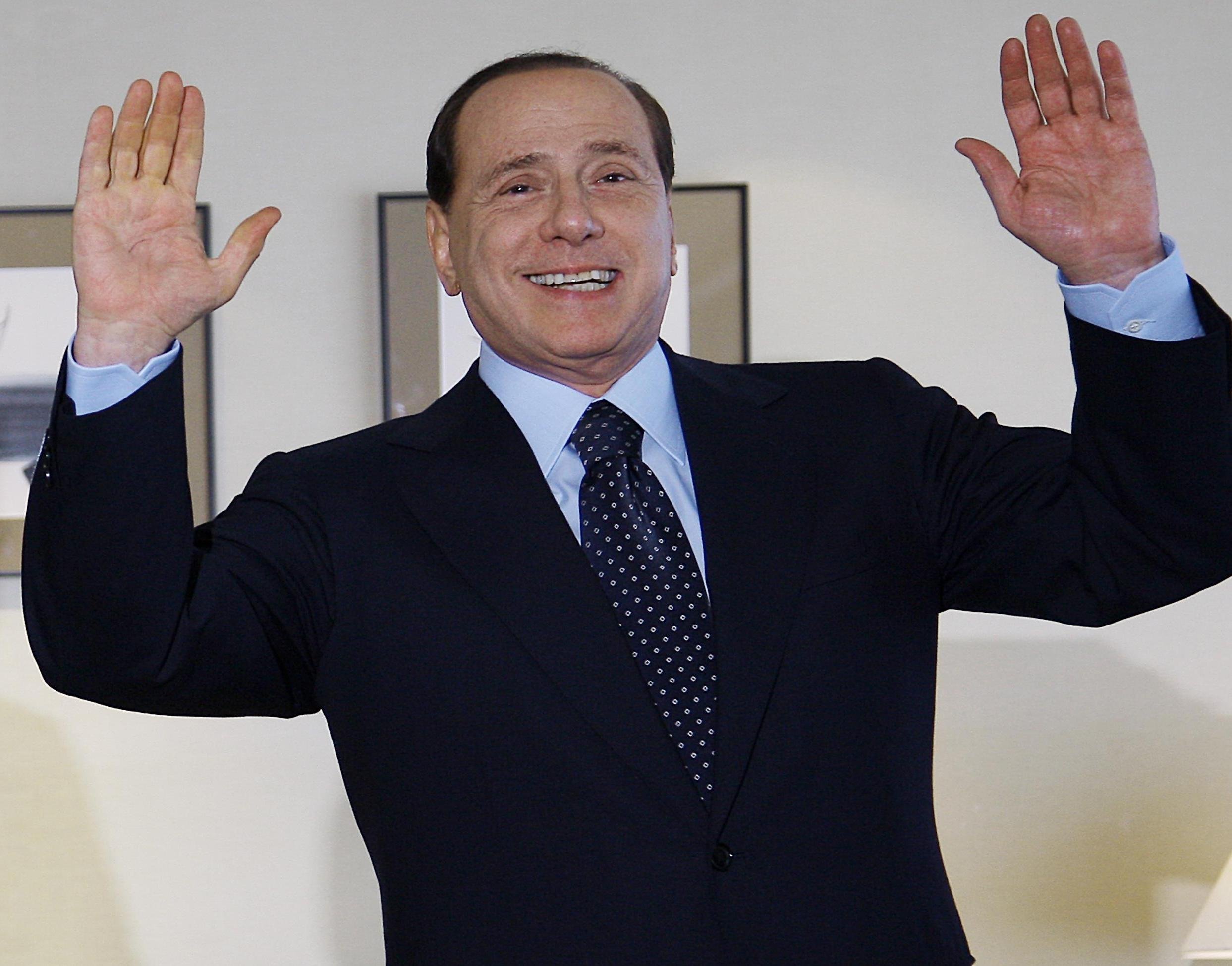 Silvio Berlusconi in Giappone.